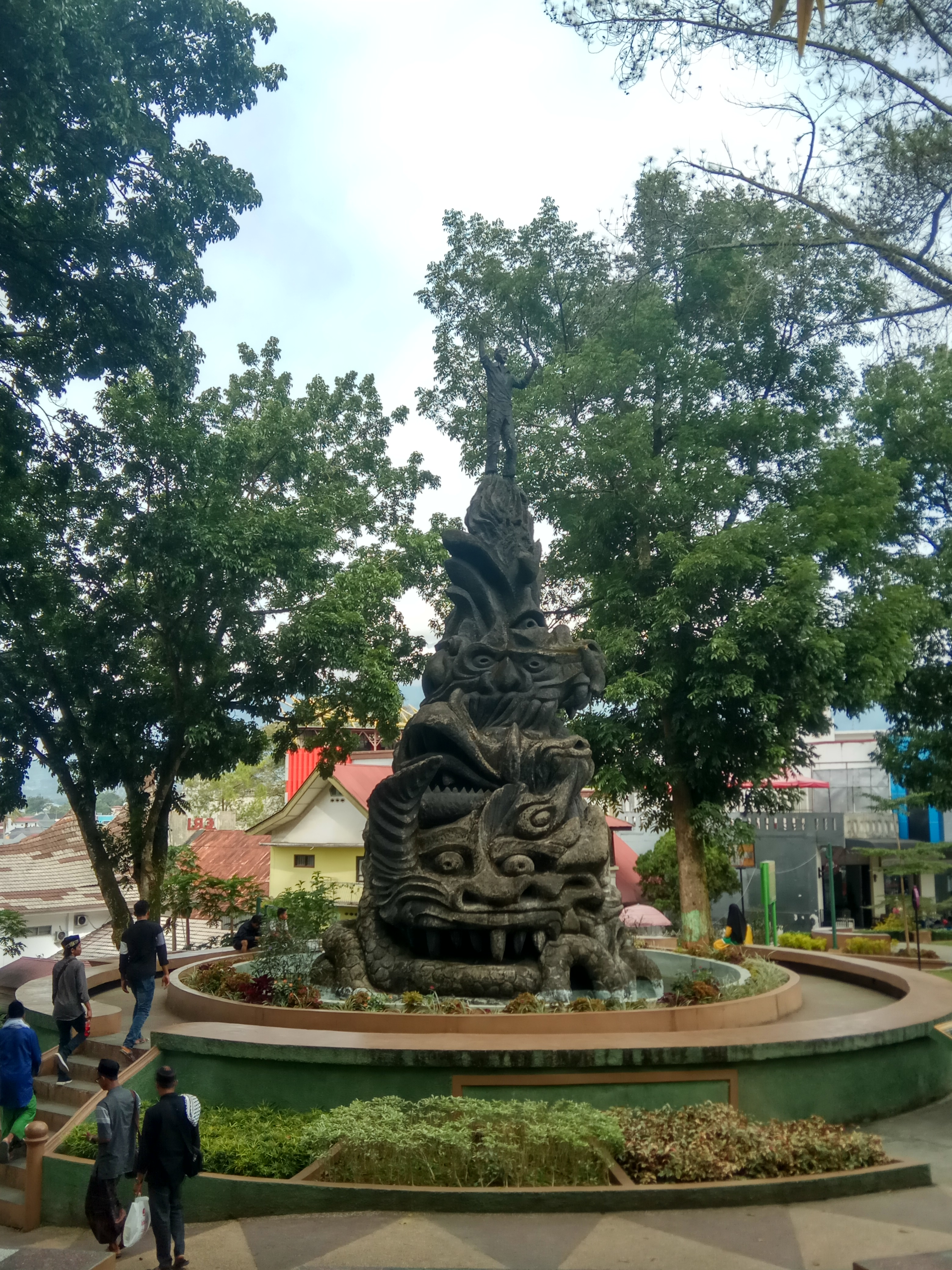 Tugu Pahlawan Tak Dikenal 2019